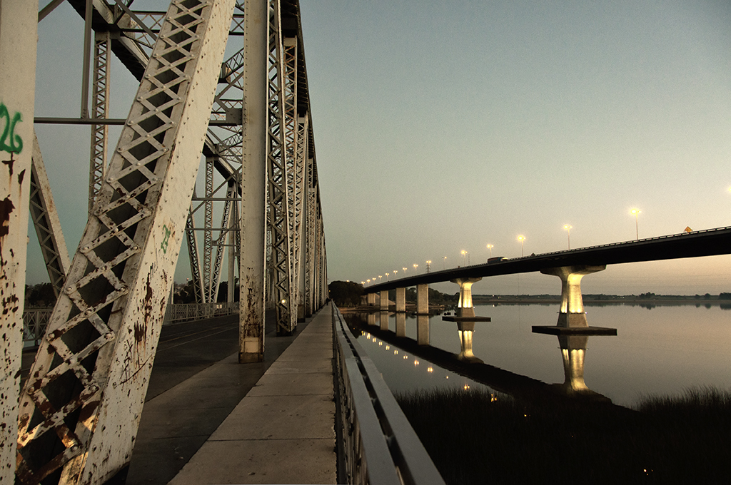 Puente de Hierro Giratorio. Ubicada en el departamento de Montevideo